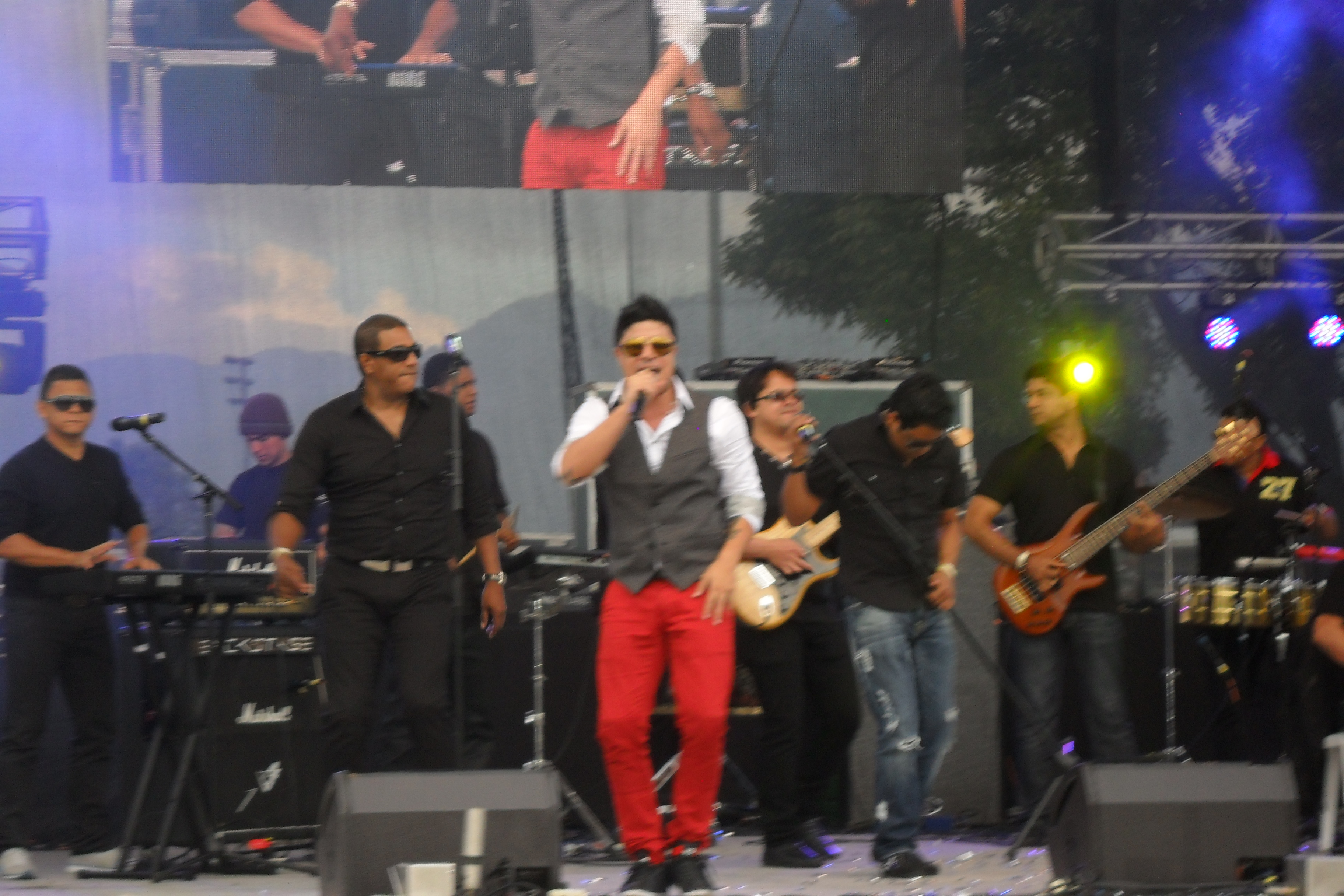 Daniel Calderon